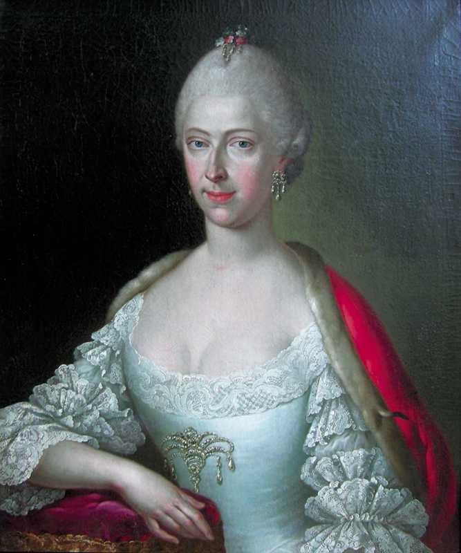 Porträt der Gräfin Hedwig Maximiliane von Dyhrn